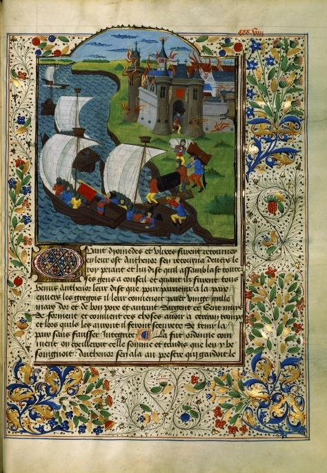 Incendie de Troie département Manuscrits occidentaux cote du document FRANCAIS 59 collection ou fonds Louis de Bruges ; librairie de Blois période du document Moyen âge date du document ou du recueil 1470? partie de Recueil des histoires de Troie. - Bruges folio, pagination Folio 308 auteur(s) Maître du Froissart de Philippe de Commynes (Enlumineur) Le Fèvre, Raoul (14..-14..) (Auteur)